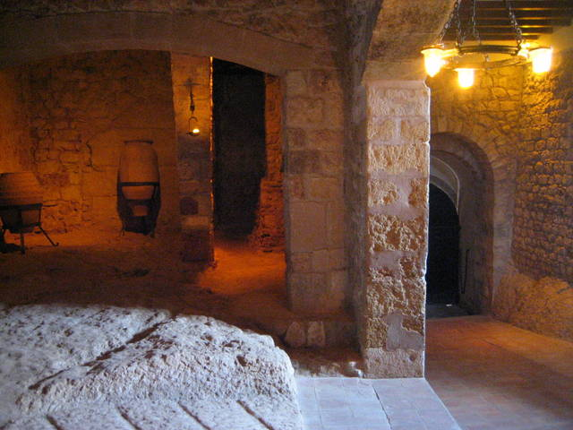 Interior castell del Papiol a la comarca del Baix Llobregat - Catalunya